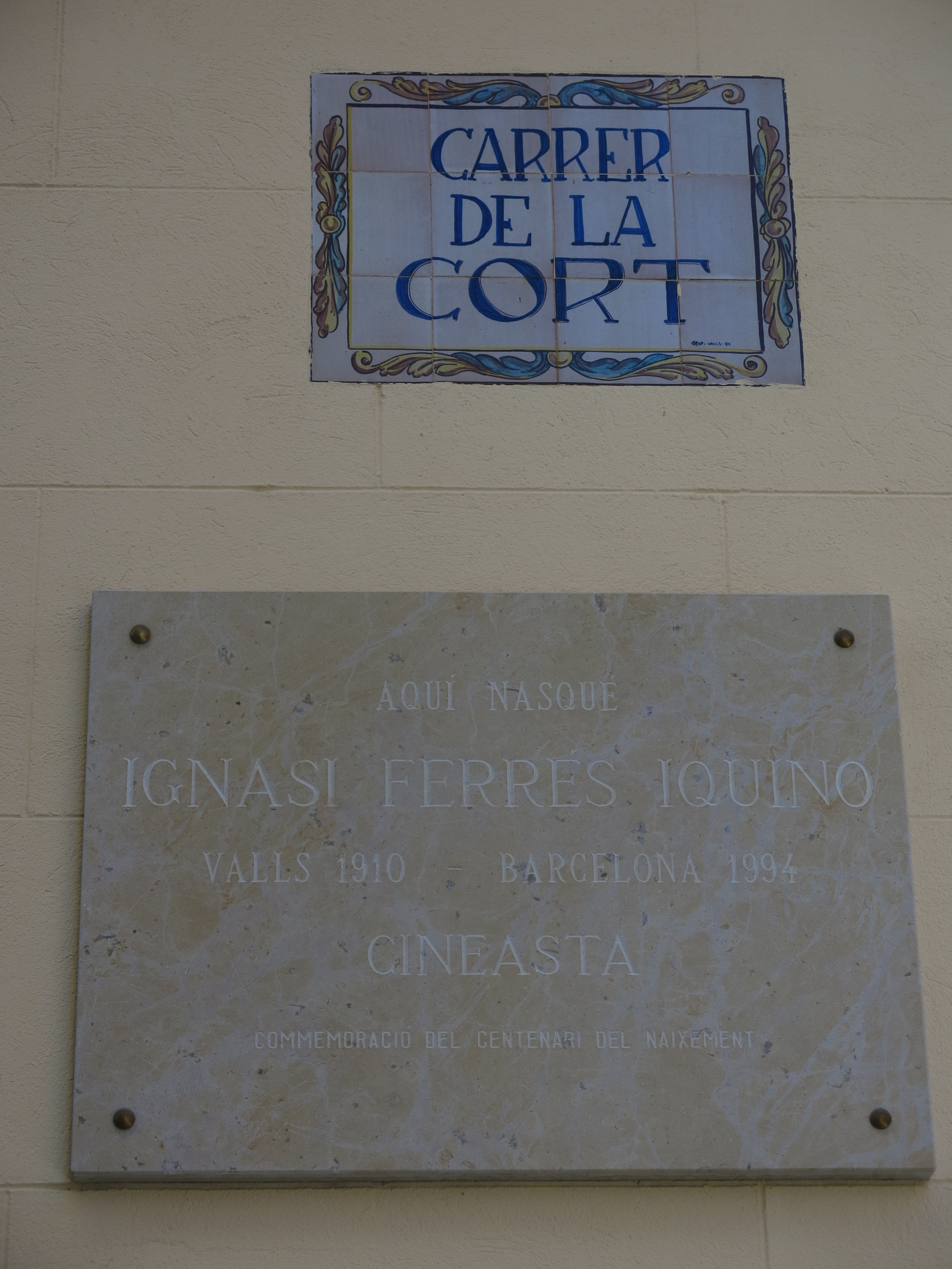 Edifici al carrer Cort, 18 (Valls)